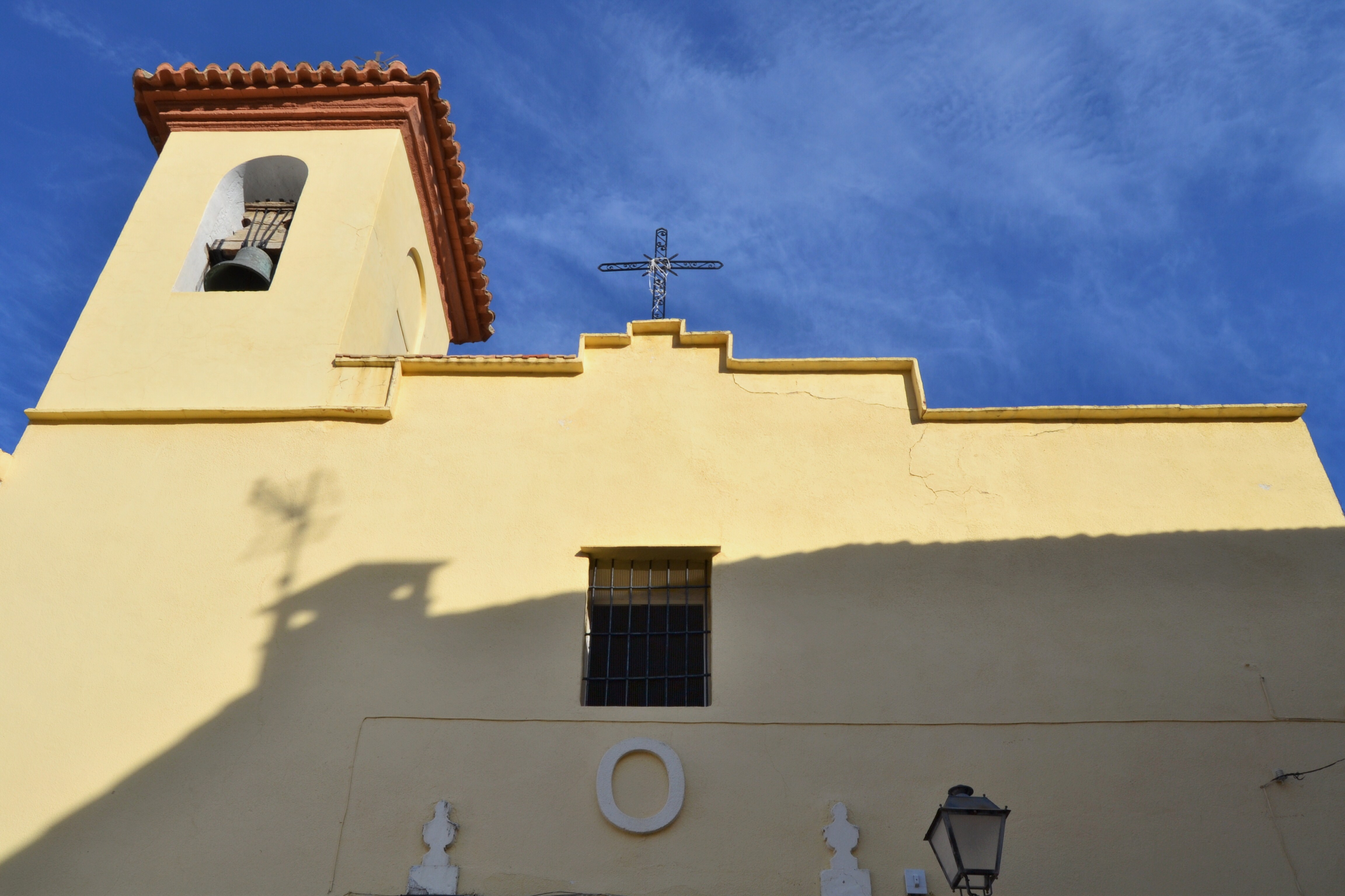 Església de santa Anna, Quatretondeta.